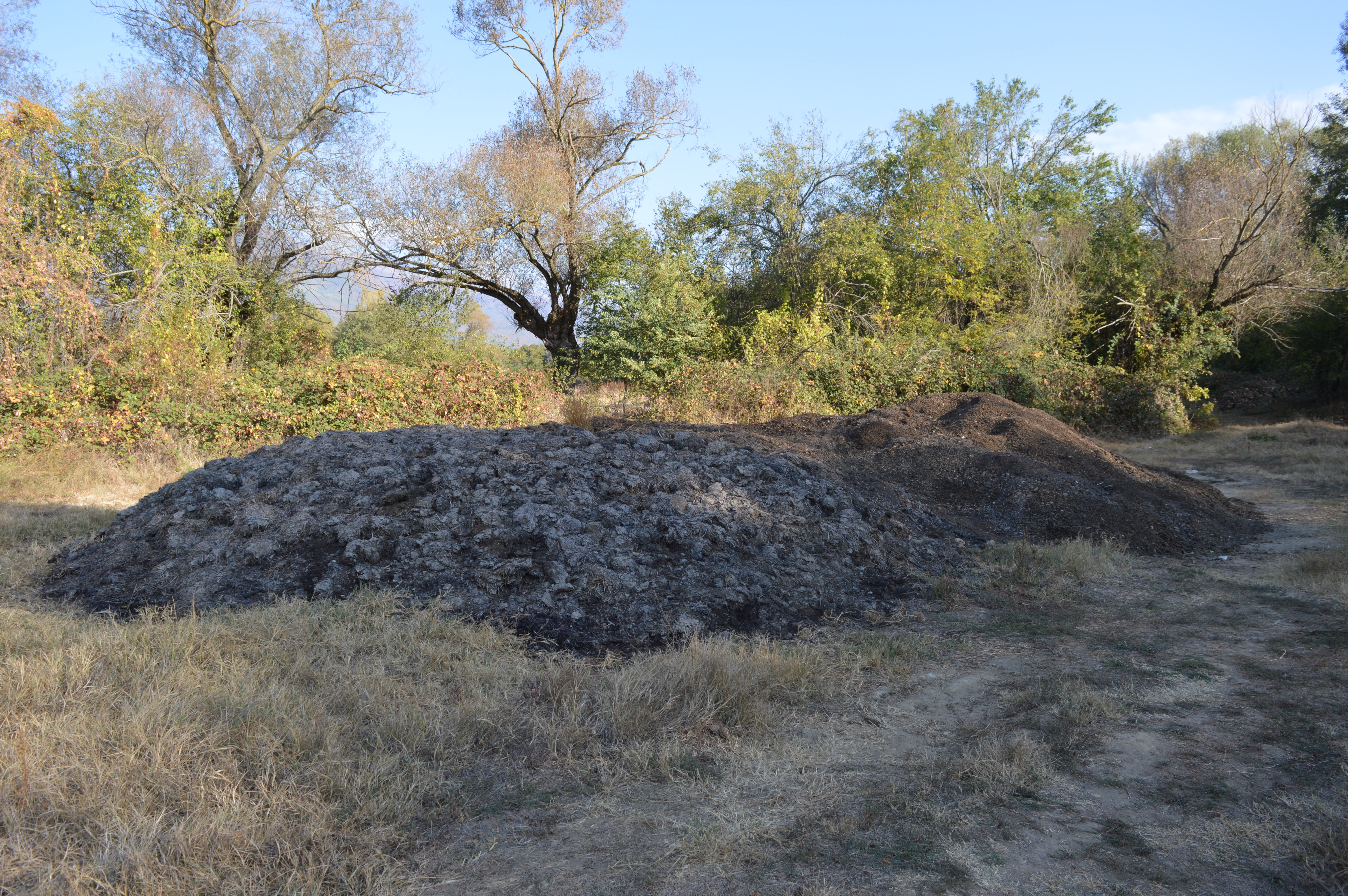 Шталско ѓубриво во Костинци, Македонија.